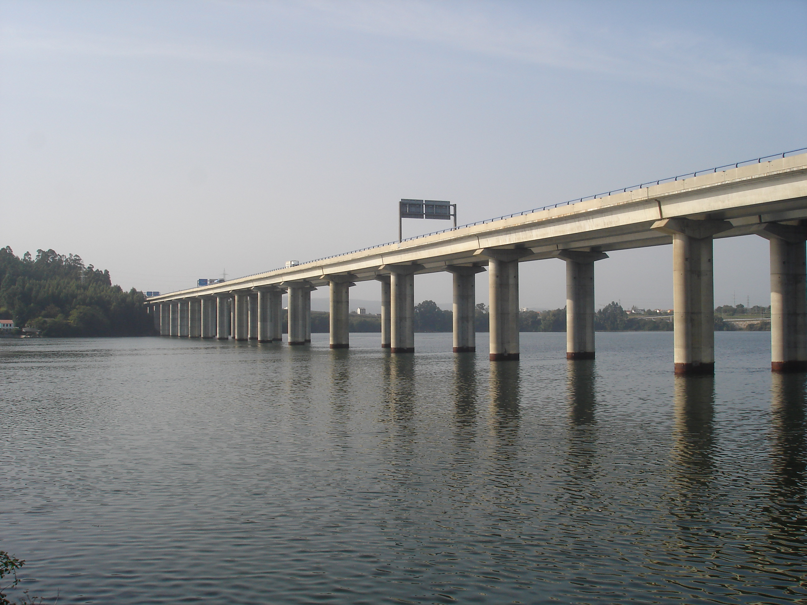 Ponte da AP-9 sobre a ría de Ferrol. Categoría:Imaxes de Narón Categoría:Imaxes de pontes de Galicia